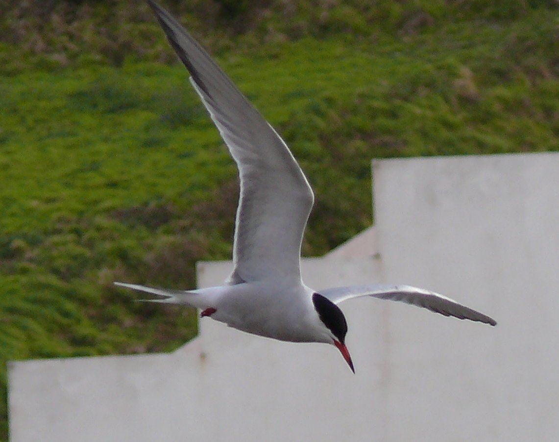 Sterna comune in volo